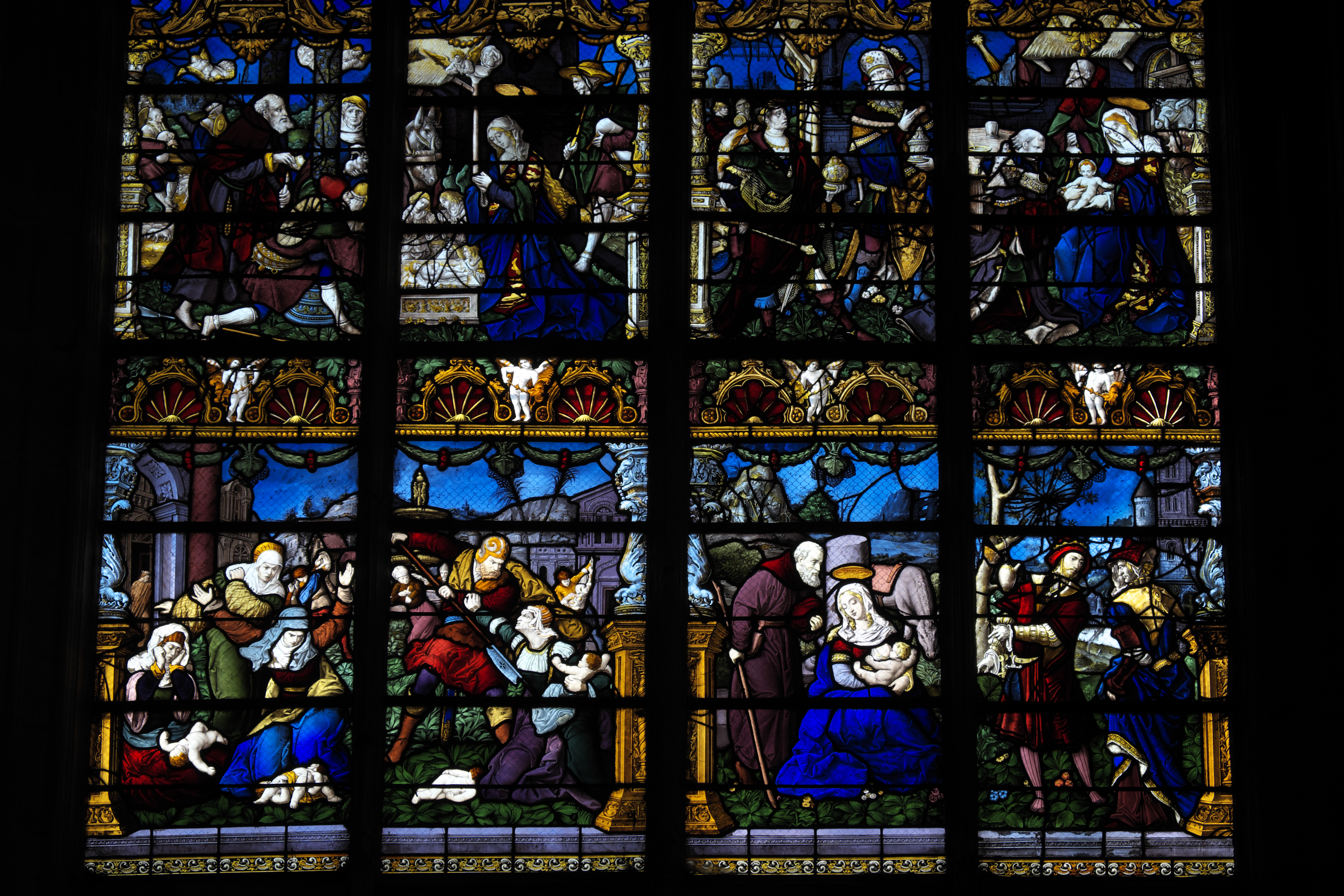 Bleiglasfenster (Baie 21) in der Stiftskirche Notre-Dame-en-Vaux in Châlons-en-Champagne im Département Marne (Champagne-Ardenne/Frankreich), um 1525 von den Küfern gestiftet; Darstellung: Geburt Christi; oben: Anbetung der Hirten und Anbetung der Heiligen Drei Könige; im Maßwerk: Werkzeuge der Küfer; die Szenen Tötung der Unschuldigen Kinder und Ruhe auf der Flucht (unten) wurden 1906 von Jean-Baptiste Anglade geschaffen